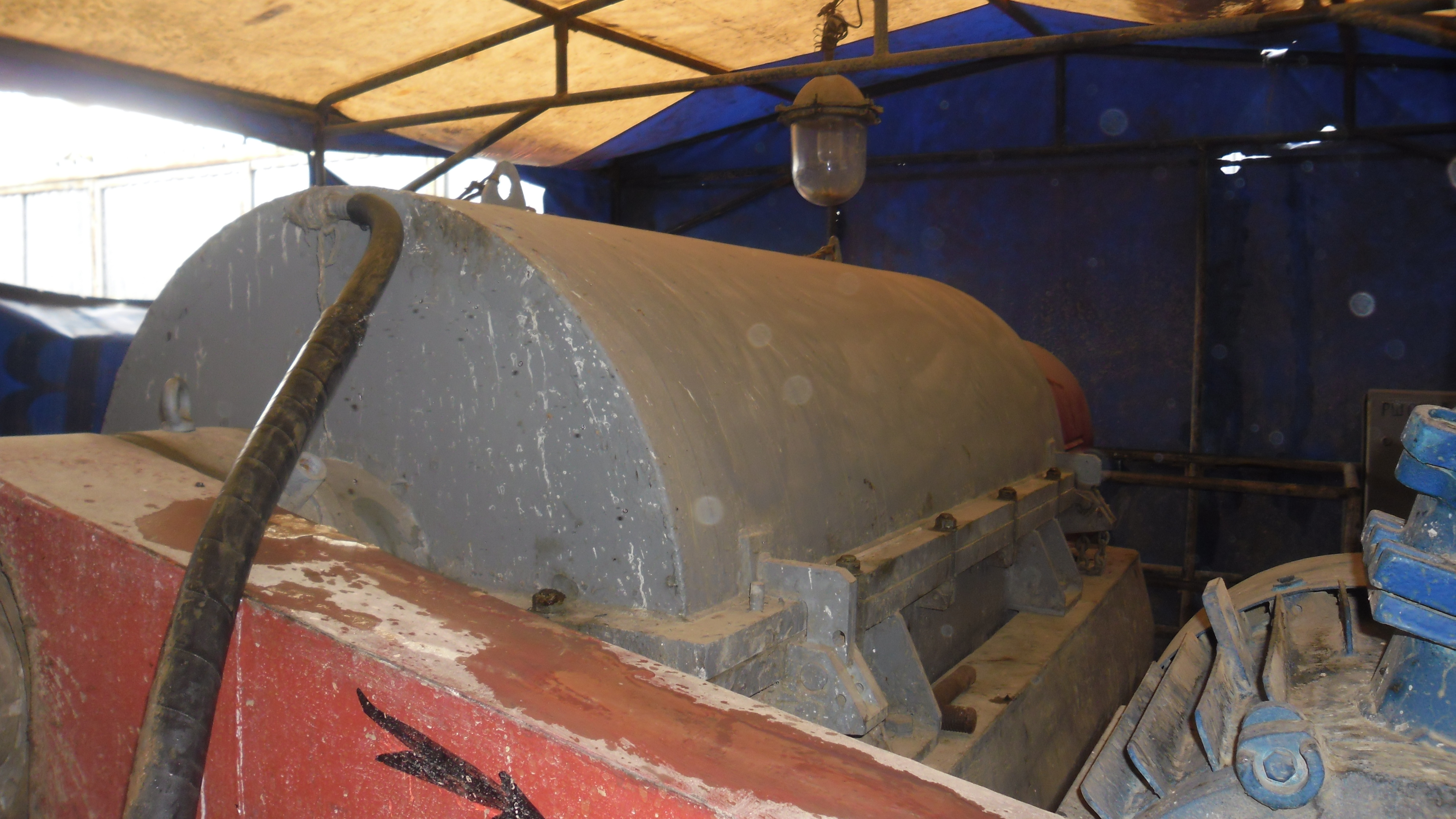 Обробка бурового розчину в центрифугах.